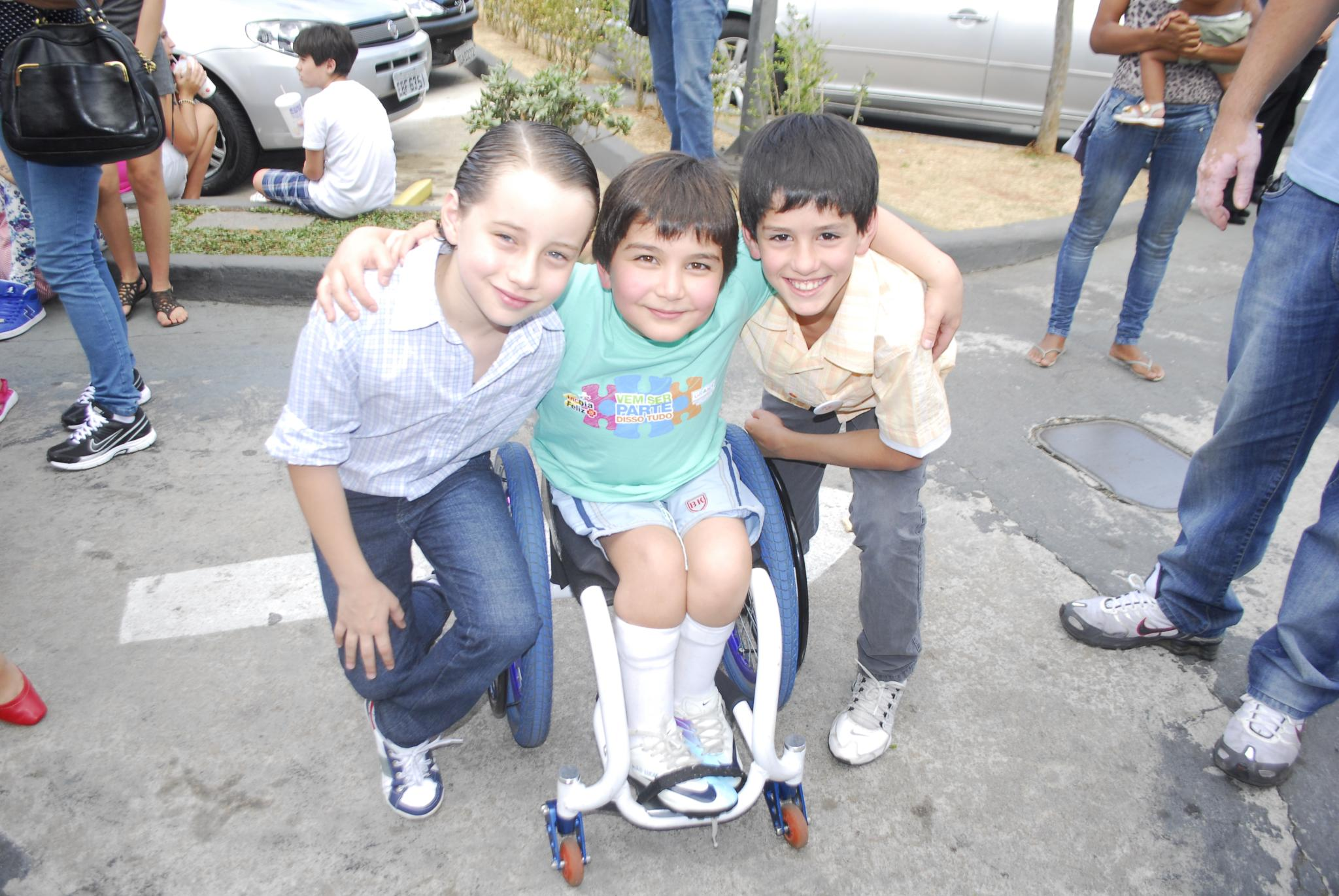 Léo Belmonte no McDia Feliz de 2012.